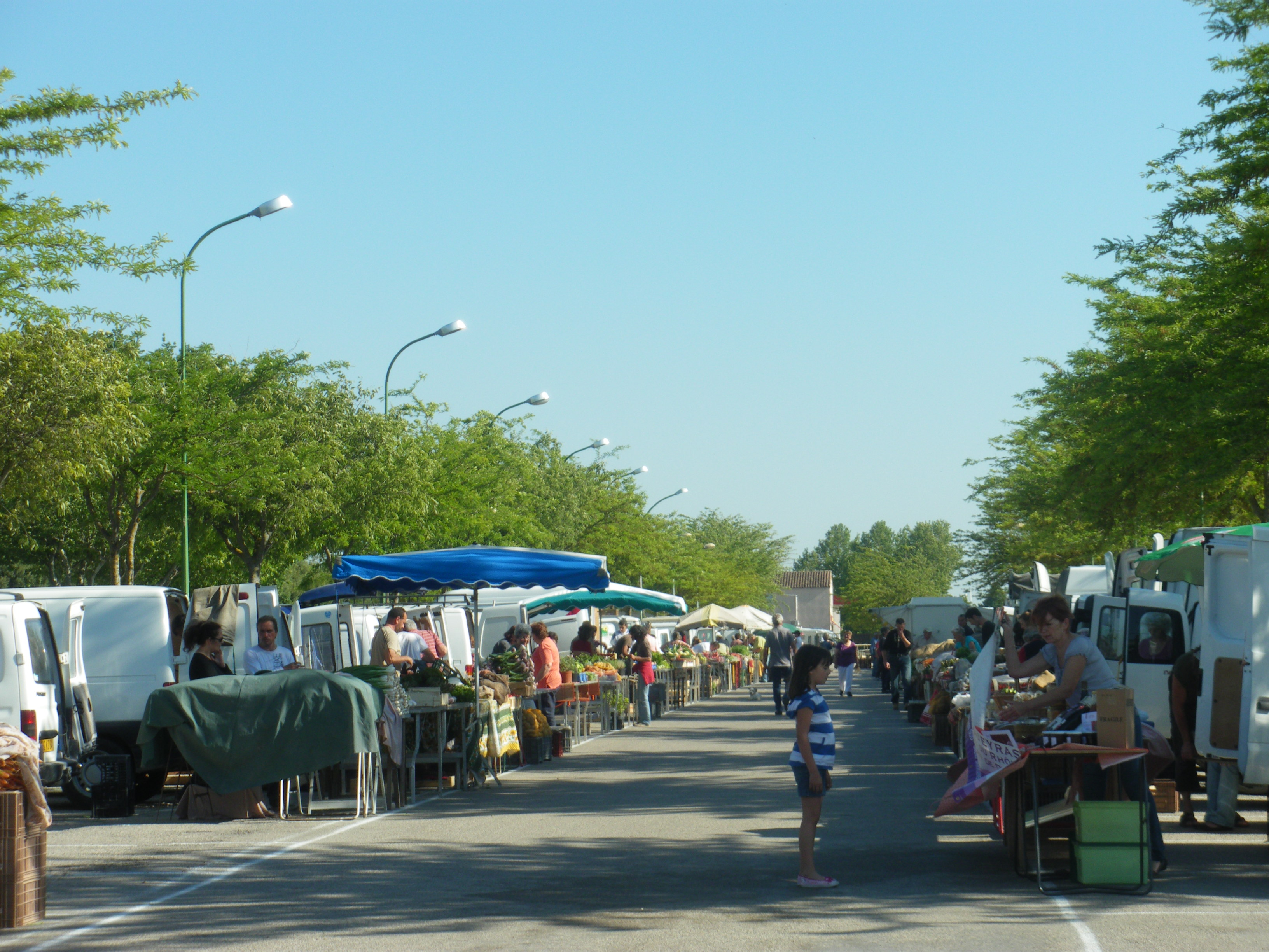 Marché agricole des producteurs de Velleron, Vaucluse